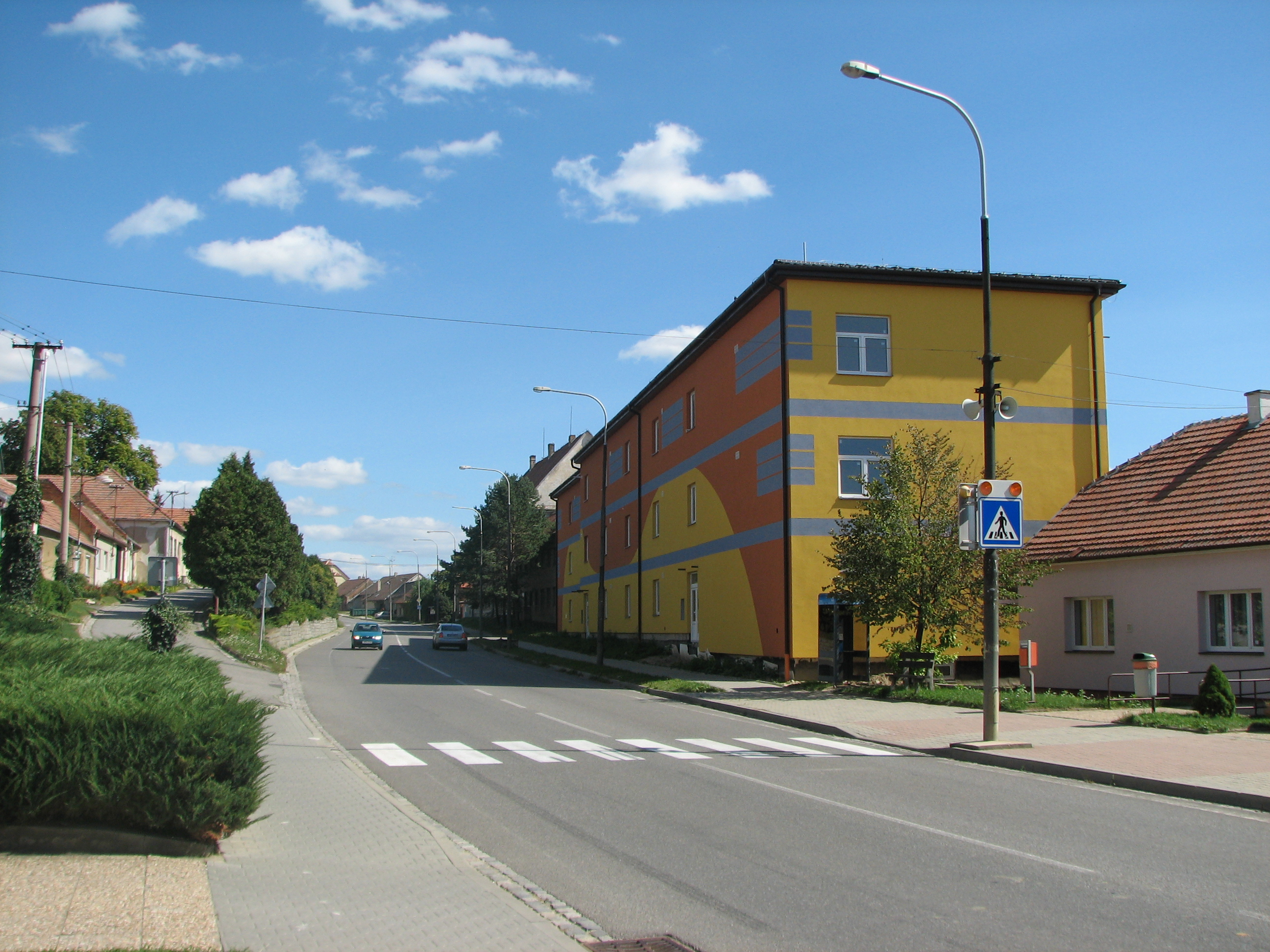 Strážovice - náves